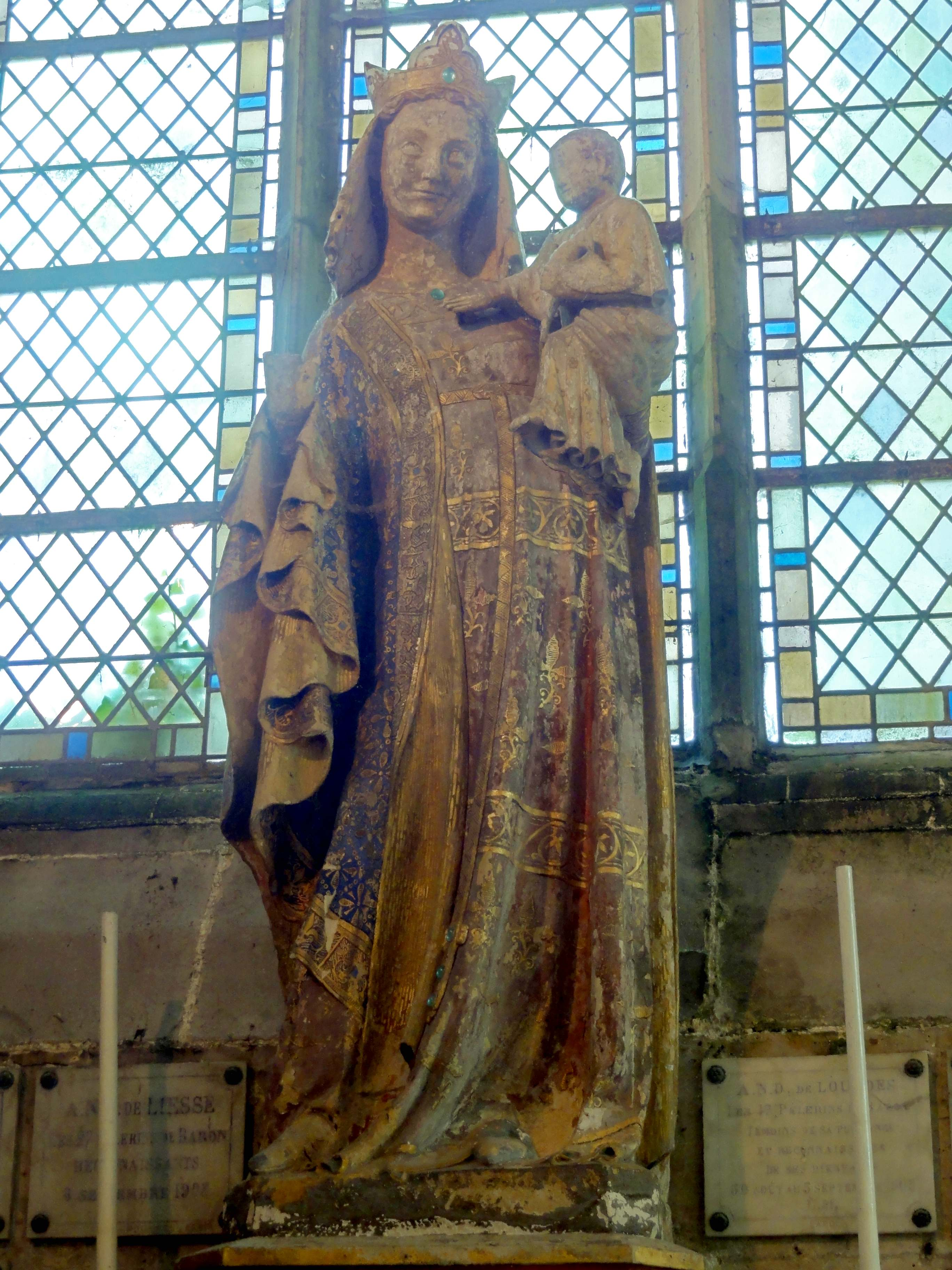 Vierge à l'Enfant.